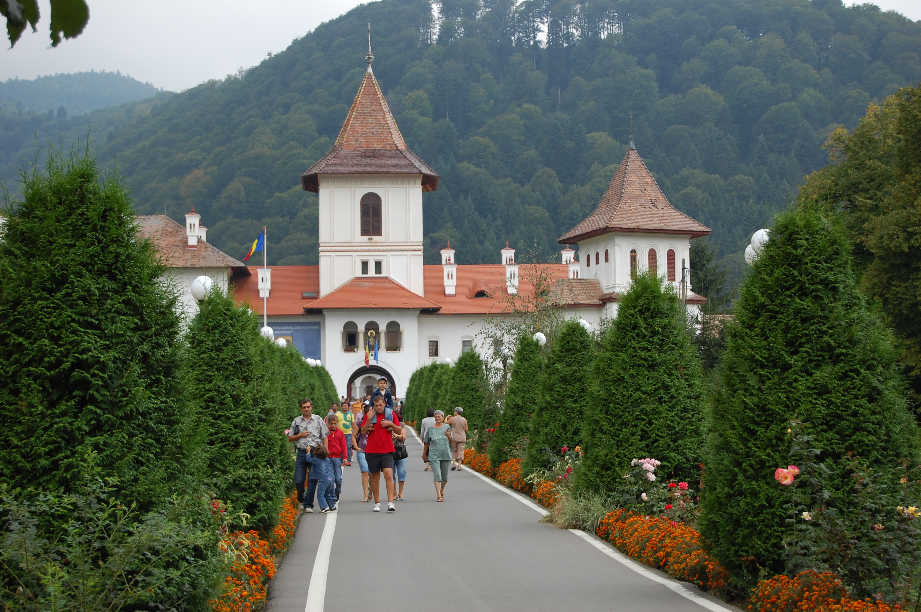 alley with flowers to the monastery